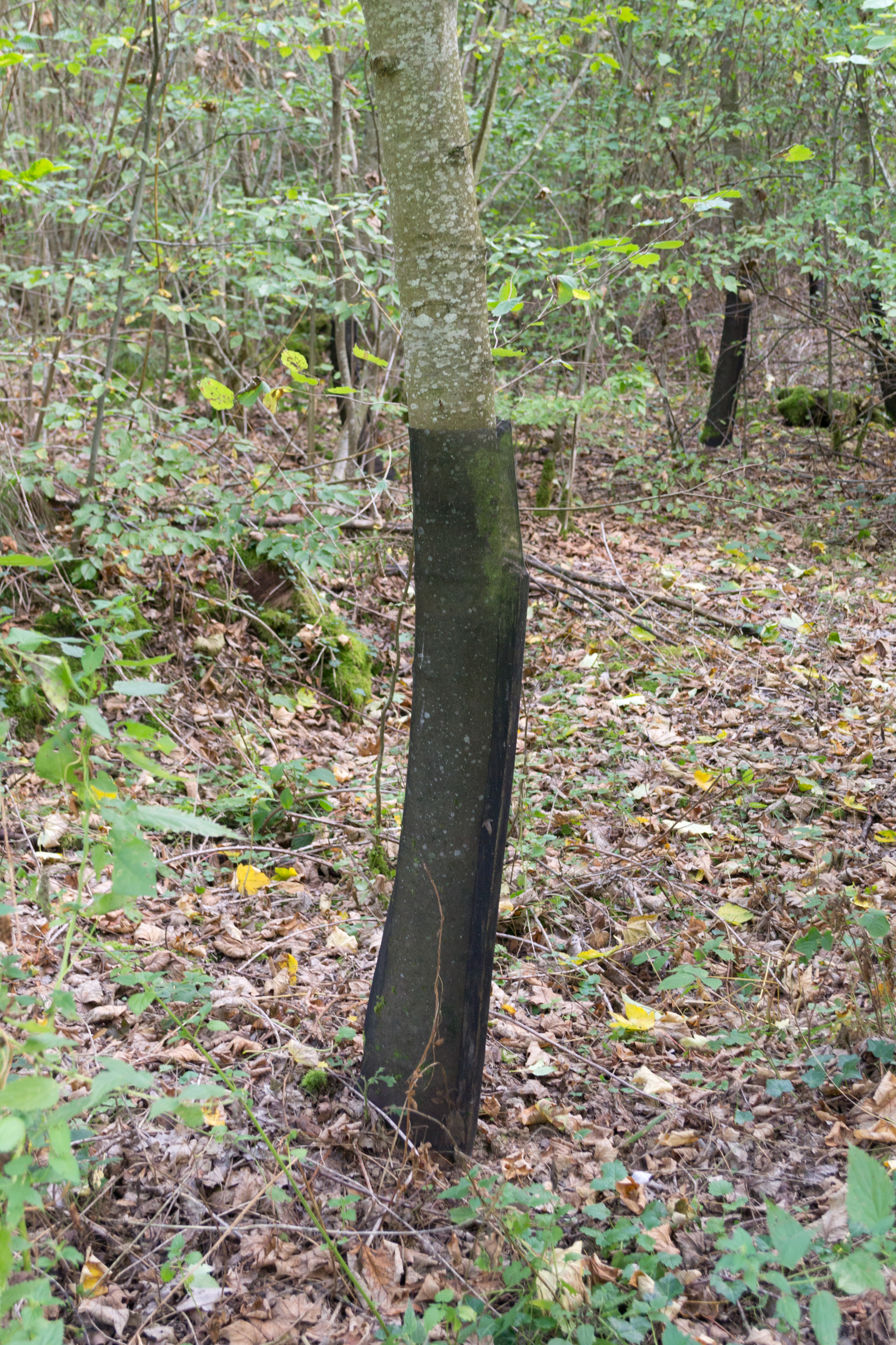 Un jeune érable, protégé des frottis et écorçages par un manchon plastique